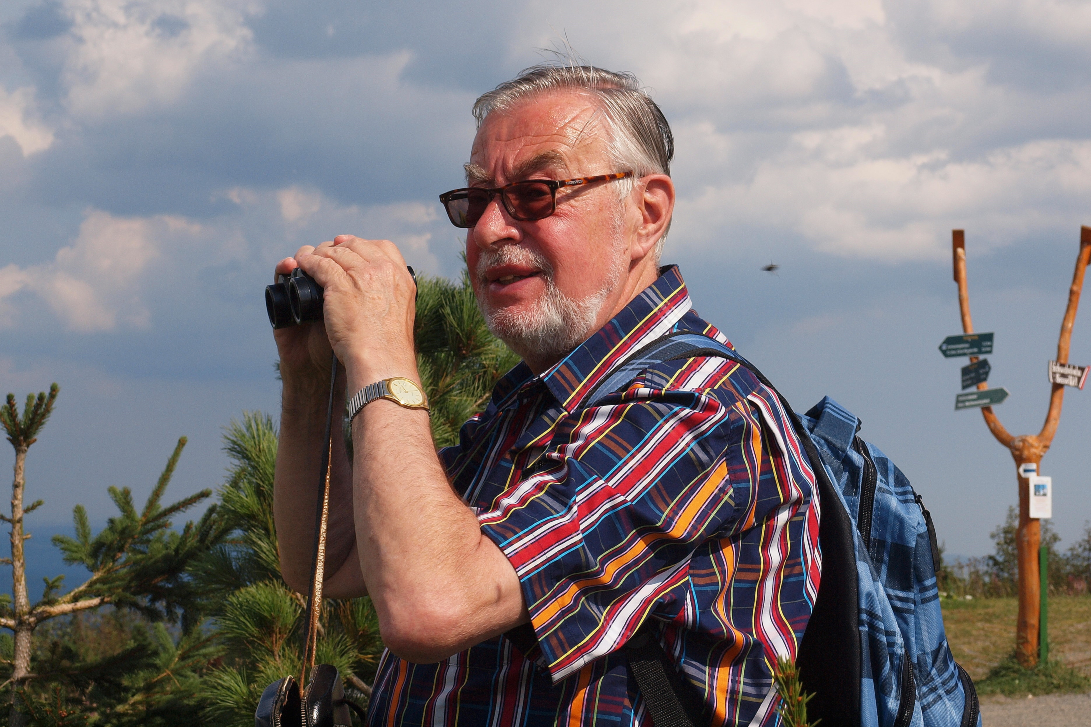 Wolfgang Eckert auf dem Fichtelberg (Erzgebirge) im September 2012